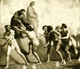 Brunetto Latini e i sodomiti nell'inferno, Canto XV.